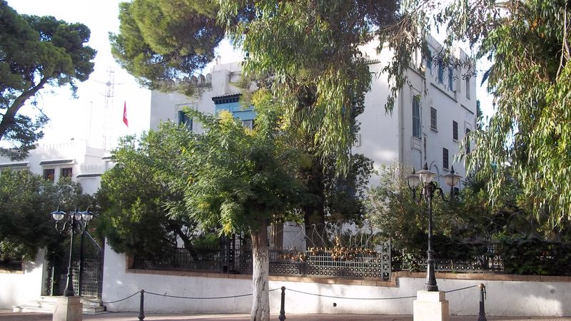 Contrôle civil du Kef en 2011